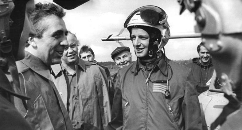 DDR, Krenz, Hubschrauberpilot, Krenz ADN-ZB Bartocha 06-05-82 DDR: Vom hohen Stand der Kampf- und Gefechtsbereitschaft der Luftstreitkräfte-Luftverteidigung der NVA überzeugte sich das Büro des Zentralrates der FDJ während eines Besuches des Kampfhubschraubergeschwaders 5 "Adolf von Lützow" in Basepohl. Egon Krenz, Kandidat des Politbüros des ZK der SED und 1.Sekretär des Zentralrates der FDJ im Gespräch mit Oberleutnant Boenig, Besatzungskommandeur einer Mi-24. Abgebildete Personen: Krenz, Egon: Vorsitzender der FDJ, Generalsekretär des ZK der SED, Staatsratsvorsitzender, DDR